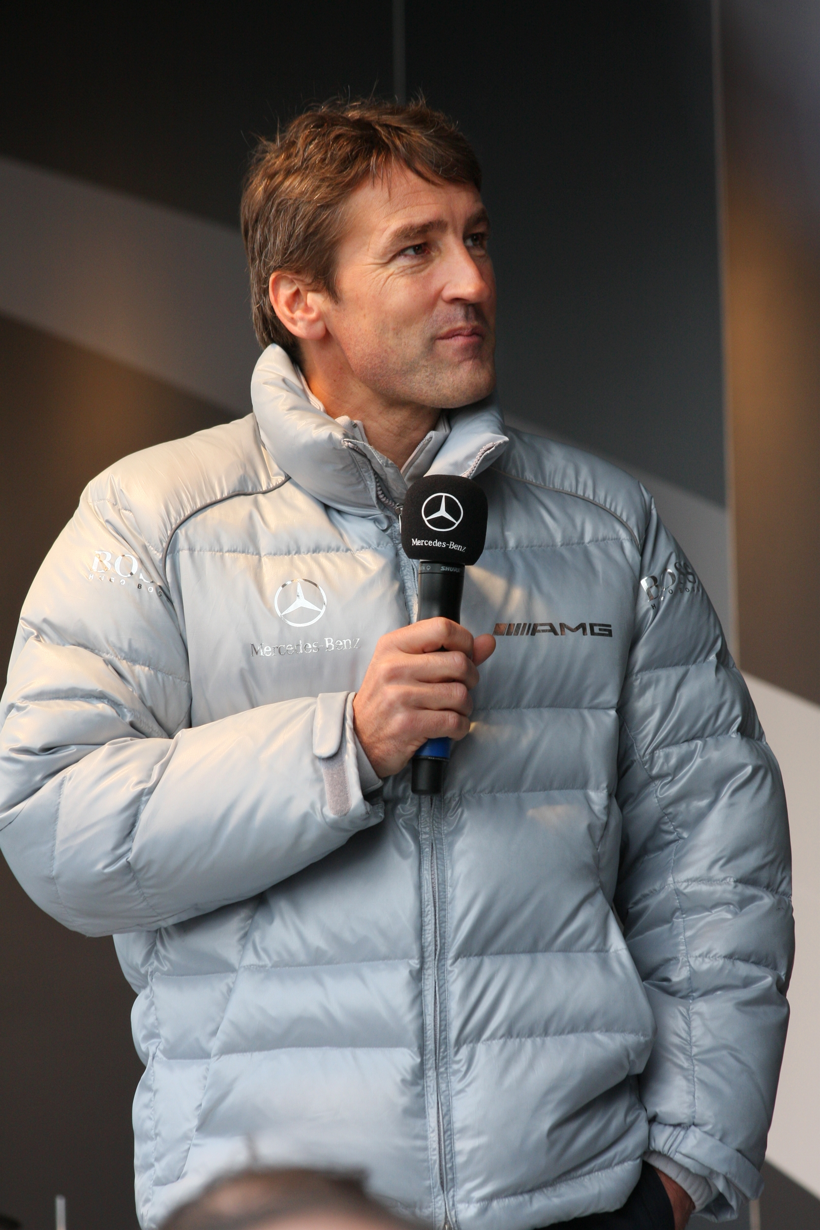 Bernd Schneider at the Hockenheimring 2008